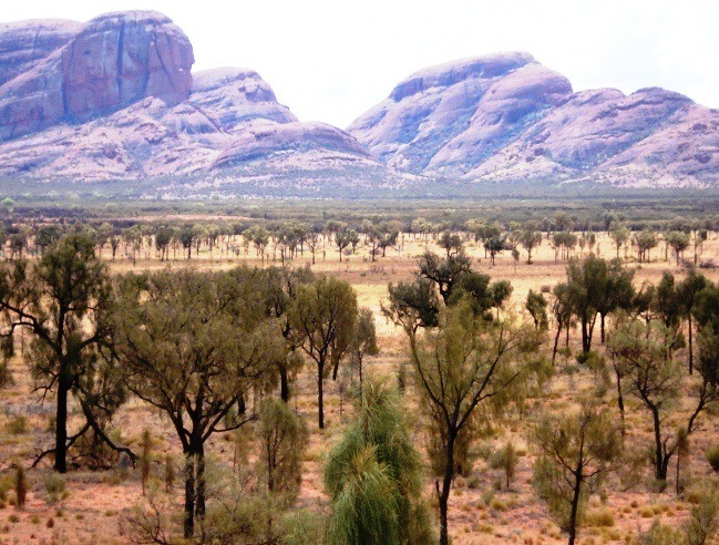 Allocasuarina decaisneana – desert oaks at Kata-Tjuta